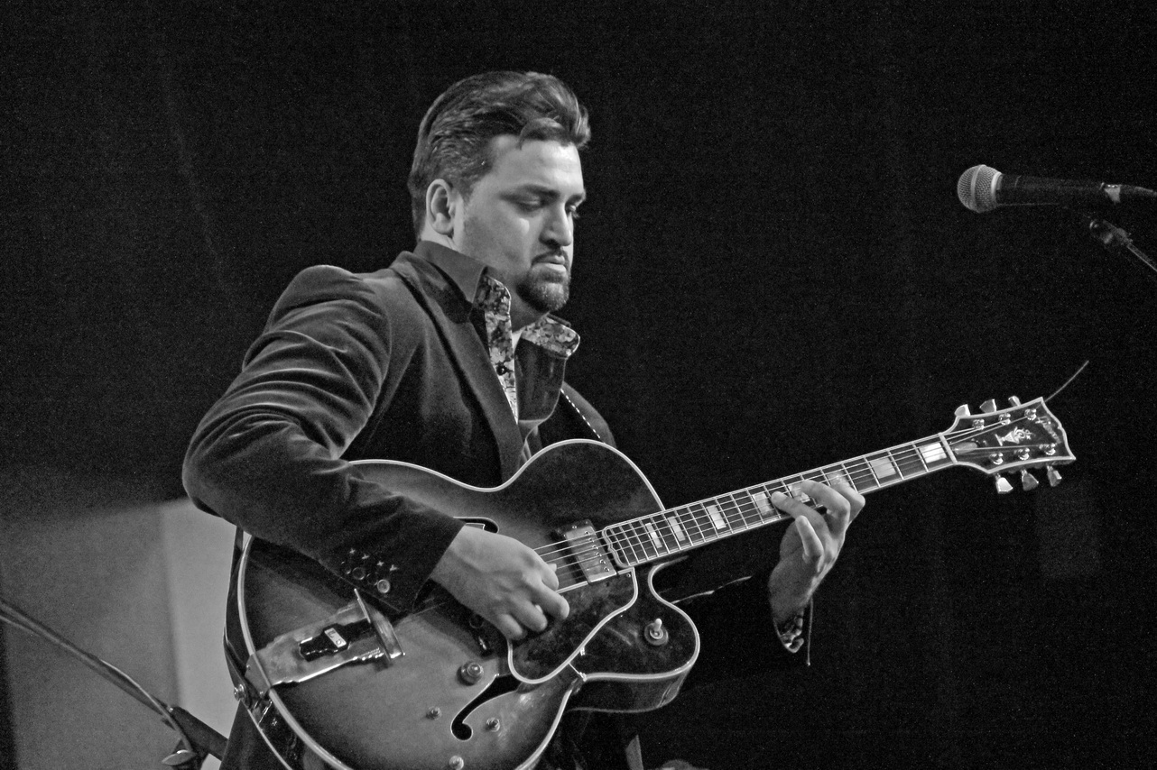 Giovanni Weiss beim St. Ingberter Jazzfestival 2017